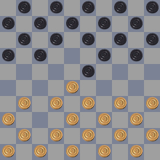 Zelfgemaakt en rechtenvrij diagrammetje